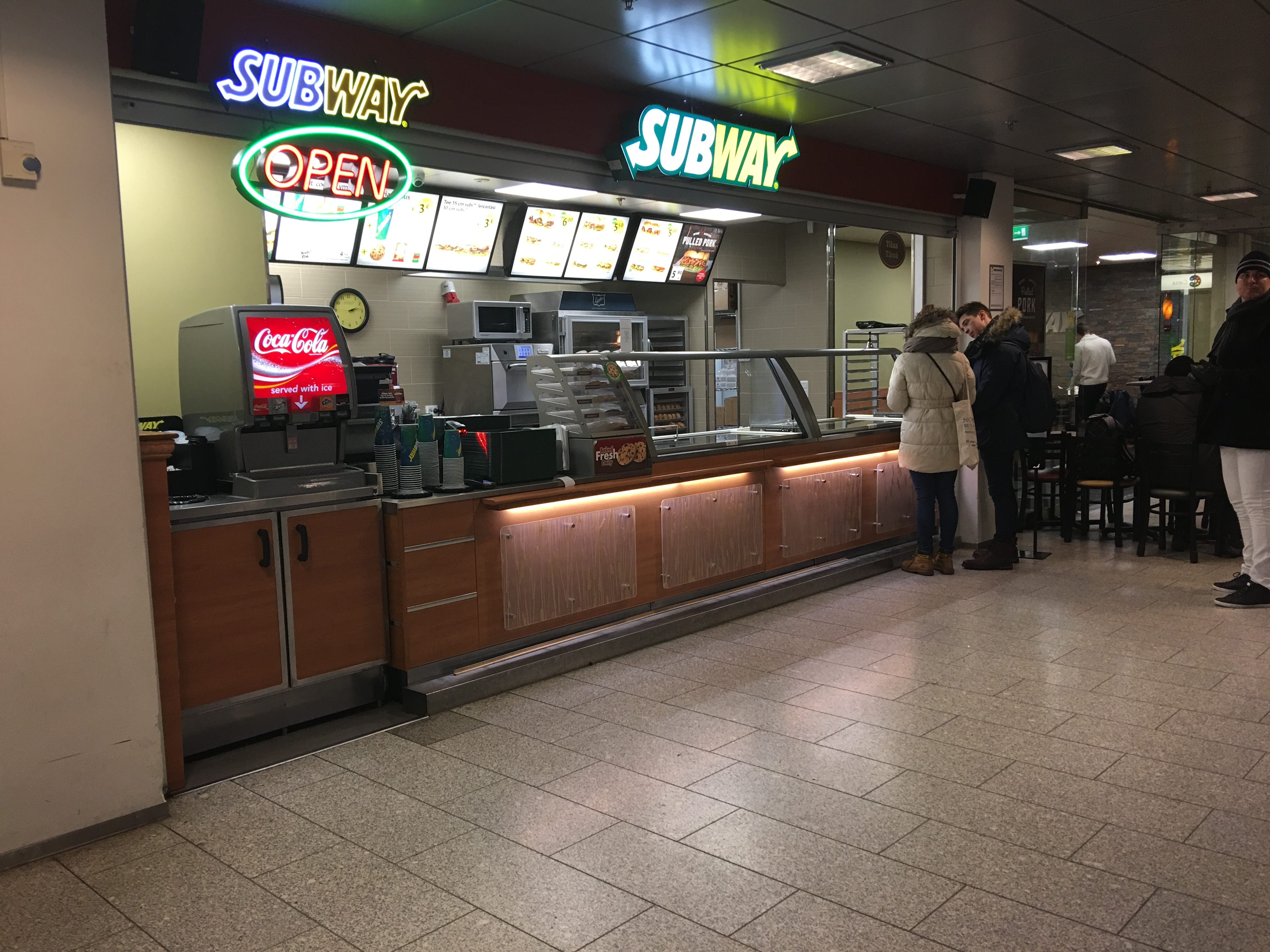 Subway Helsingin yliopiston metroasemalla.